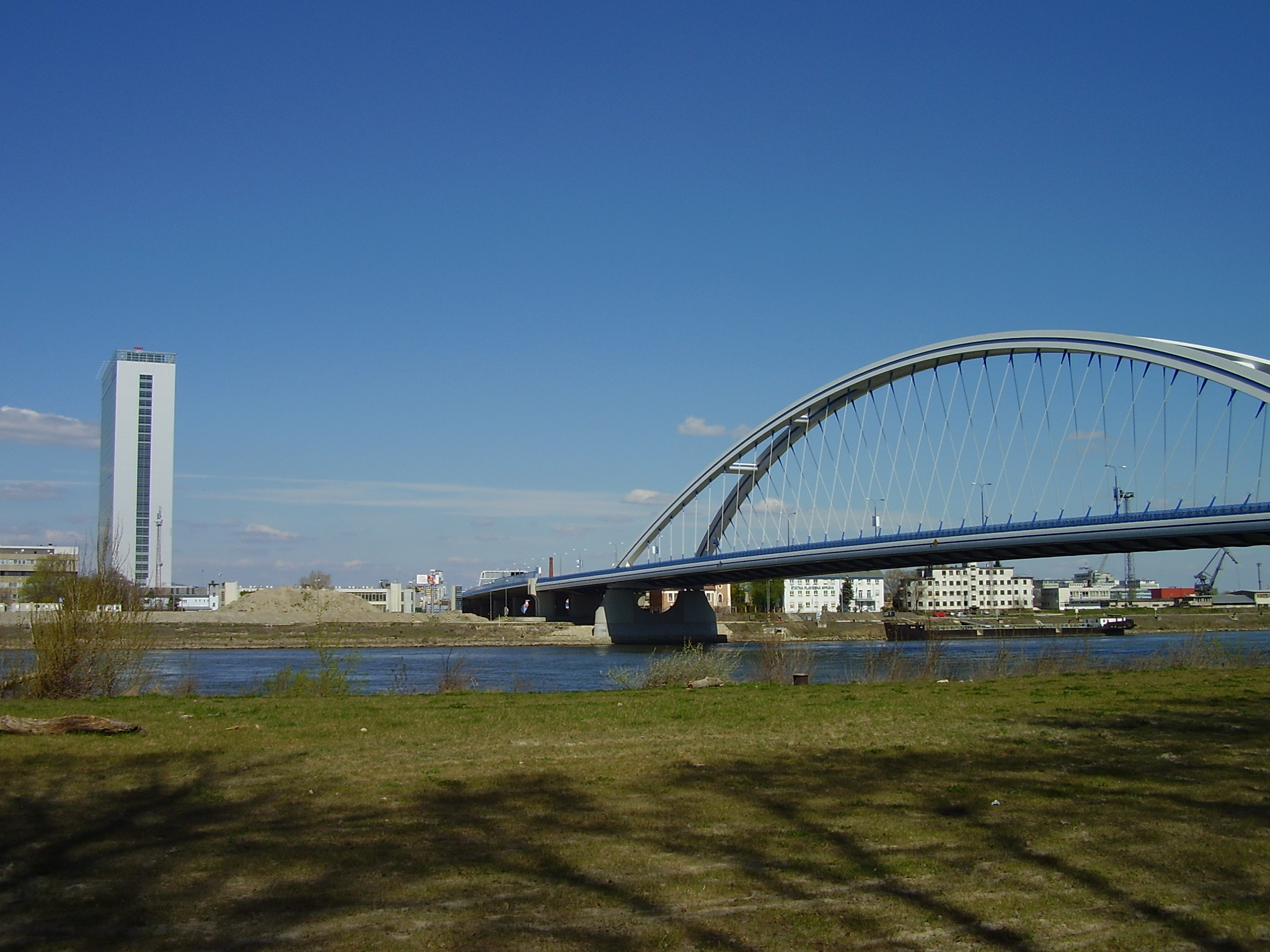 Bratislava